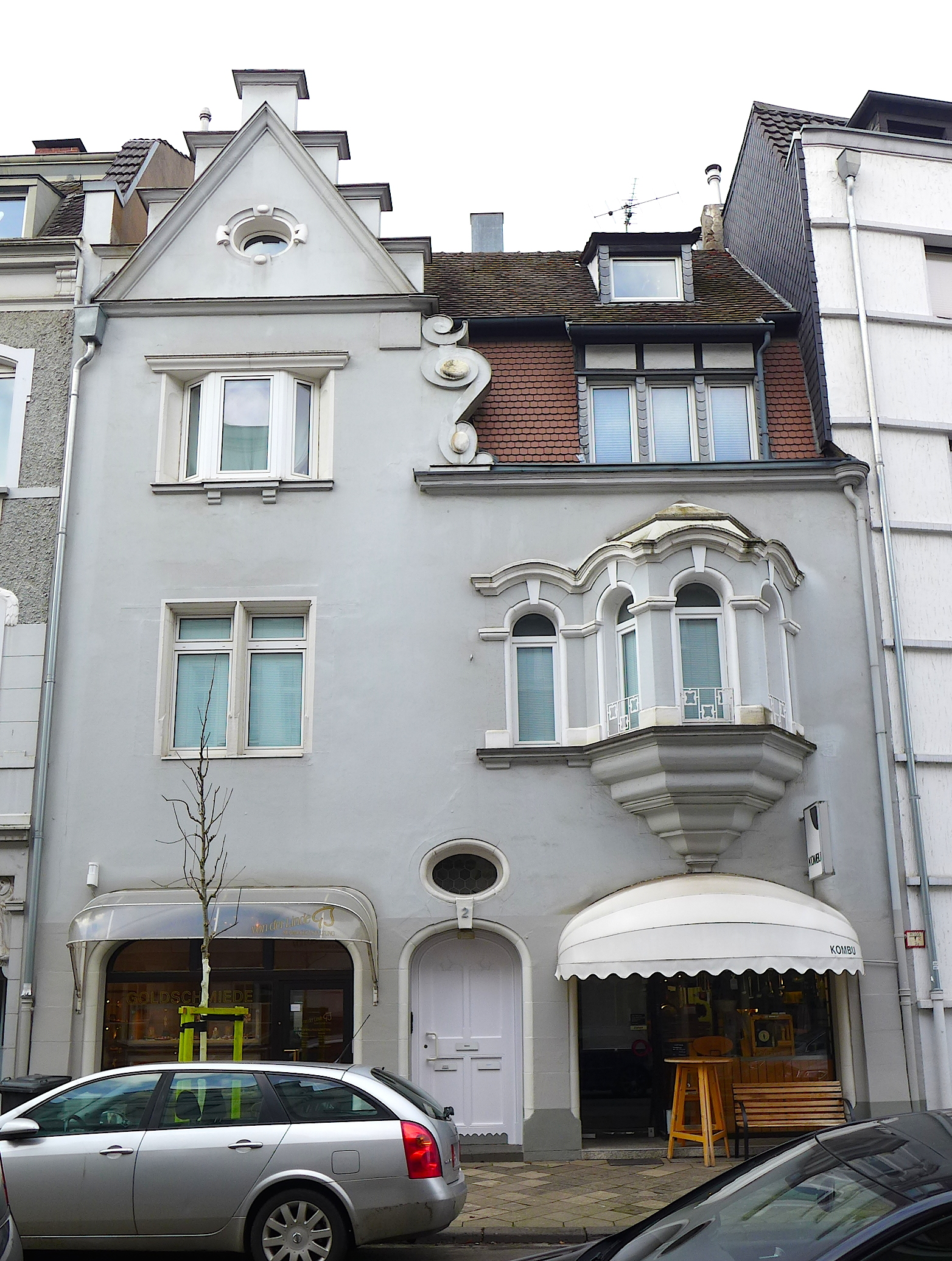 Дом № 2 по улице Софии в Бенрате (Дюссельдорф). Памятник архитектуры. 29 января 2019.